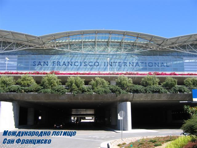 Международно летище Сан Франциско (авторска снимка)